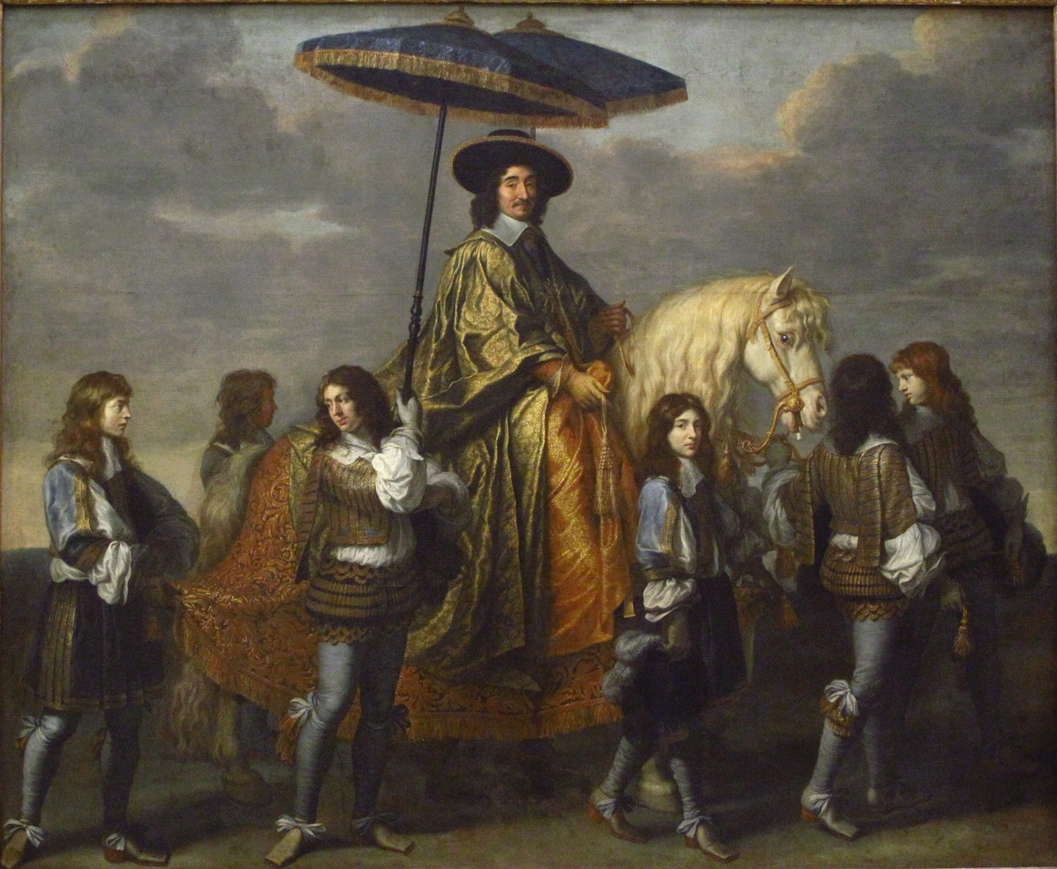 Pierre Séguier, premier magistrat du royaume, fut le principal protecteur de Le Brun pendant sa jeunesse. Ce portrait fut sans doute peint dans le contexte de l’Entrée royale de Louis XIV et de Marie-Thérèse à Paris, le 26 août 1660, après leur mariage à Saint-Jean-de-Luz le 9 juin de la même année.